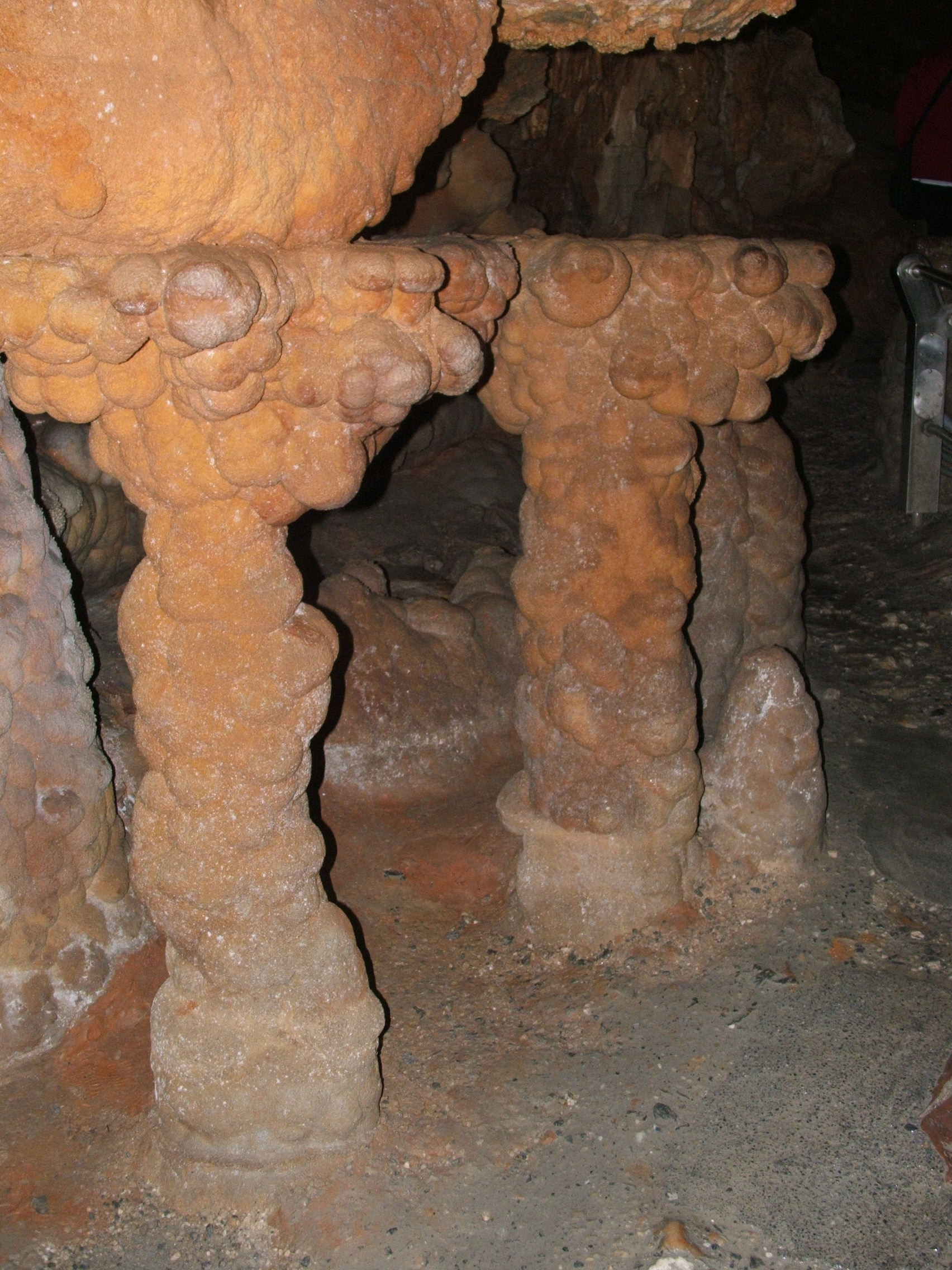 Grotte di Toirano, a Toirano, Savona, Liguria, Italia